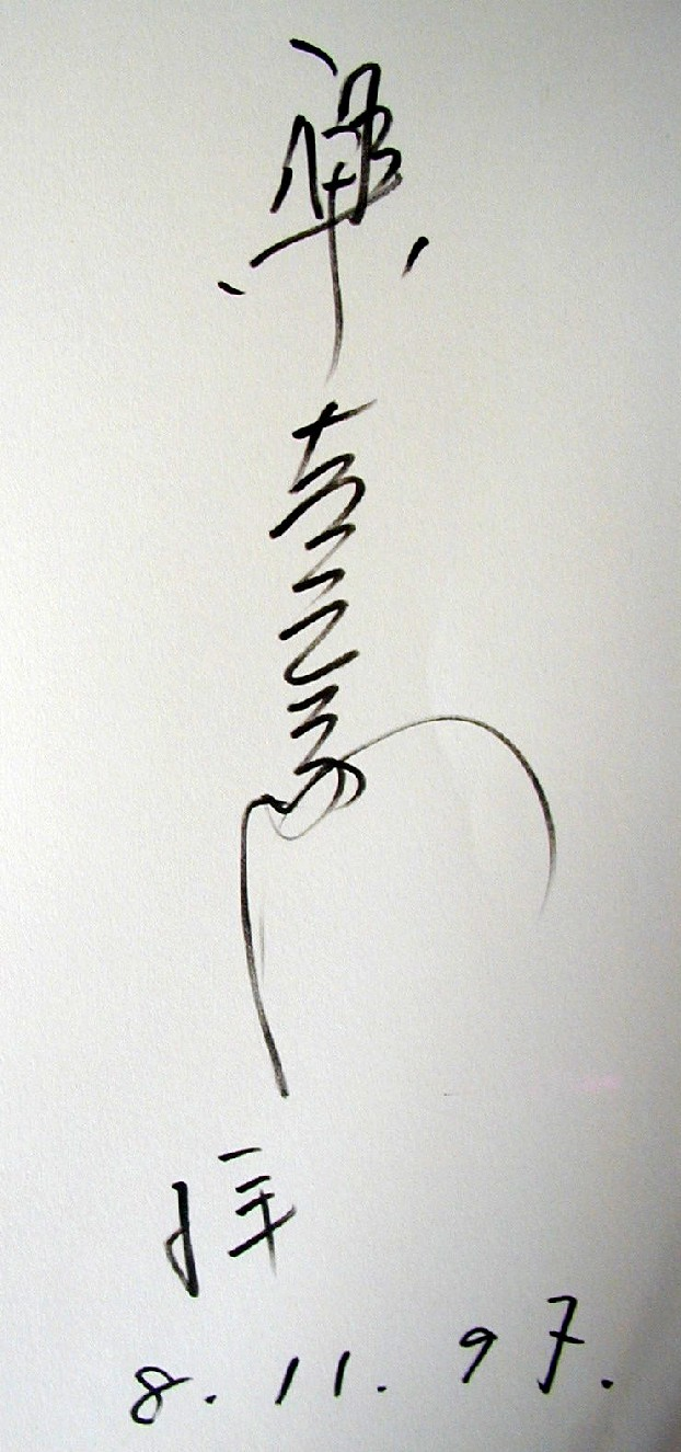 Autografo Raku XV - Kichizaemon Raku è il quindicesimo discendente di Chojiro il primo maestro ceramista che alla fine del '500 ebbe il diritto per se e i suoi discendenti di assumere il nome Raku. L'attuale capo della famiglia è venuto spesso in Italia dove ha passato anche un periodo di studio. L'autografo è stato apposto in occasione della mostra "Raku, una famiglia di ceramisti giapponesi" tenutasi a Faenza.